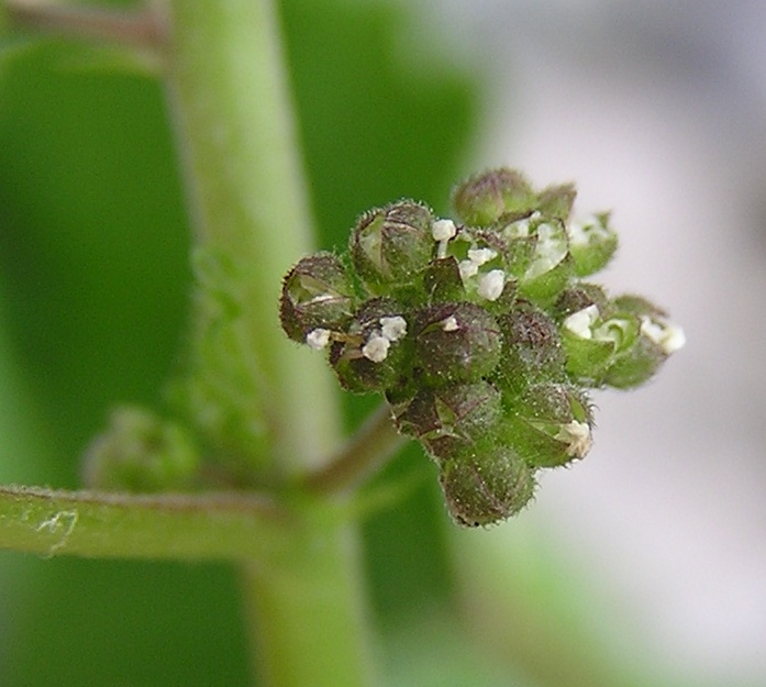 Fatoua villosa, Blütenstand, gefunden an einem Straßenrand in Shigaraki (Präfektur Shiga, Japan).